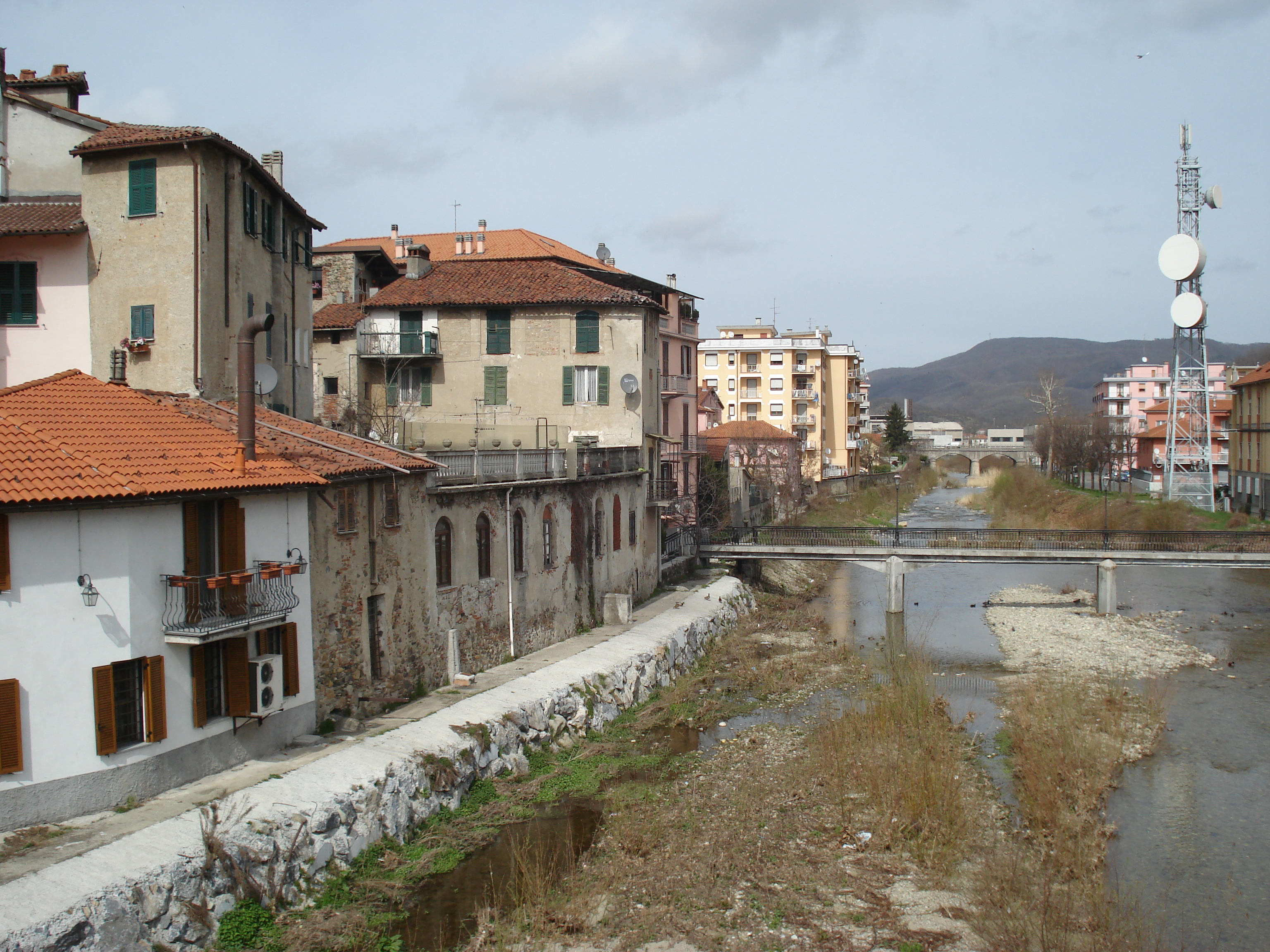 Cosmin latan,21-03-2008,Carcare